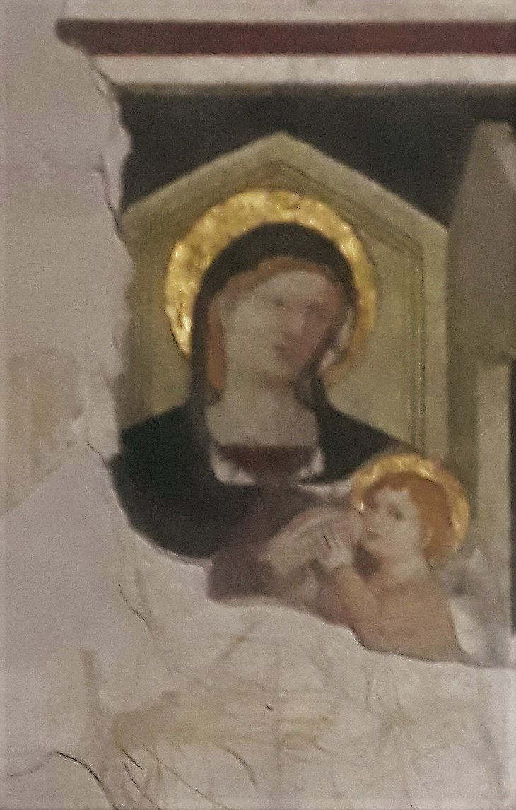 Madonna allattante affresco del pittore veronese Giacomo da Riva. Chiesa di Santo Stefano a Verona (1388)